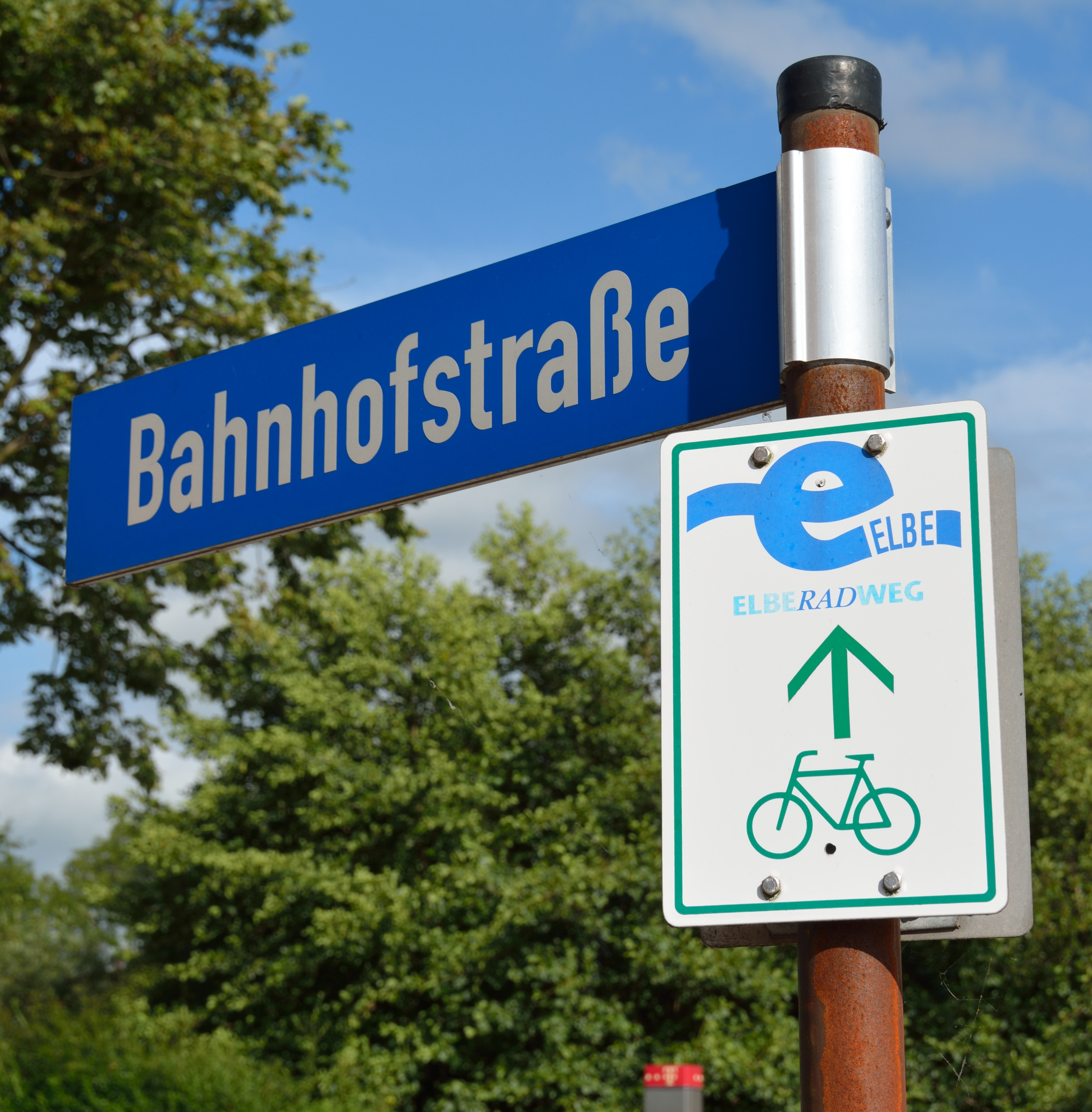 Brunsbüttel, Himweis Elbe-Radweg